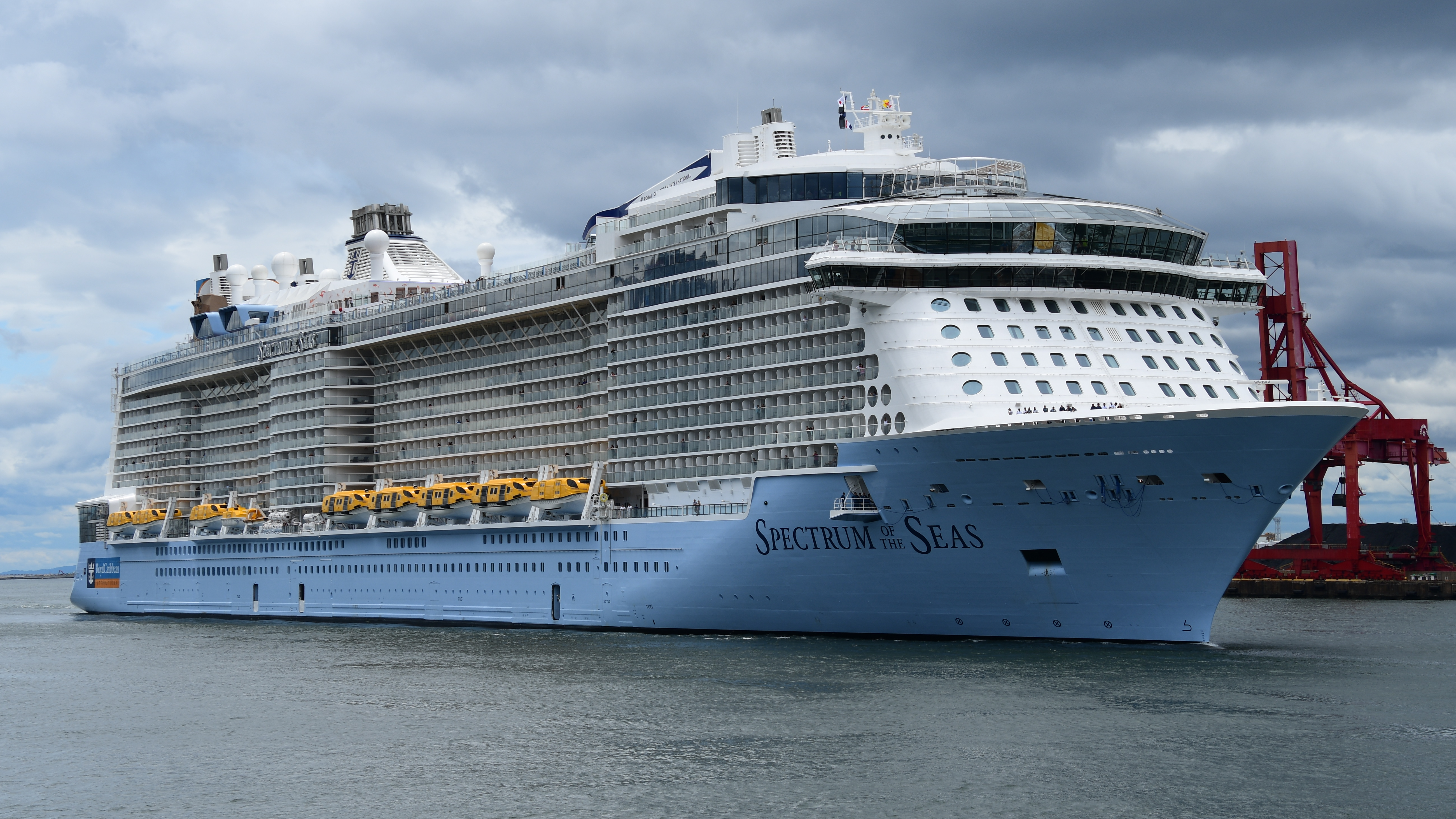 大阪天保山に入港するスペクトラム・オブ・ザ・シーズ Nikon D7500